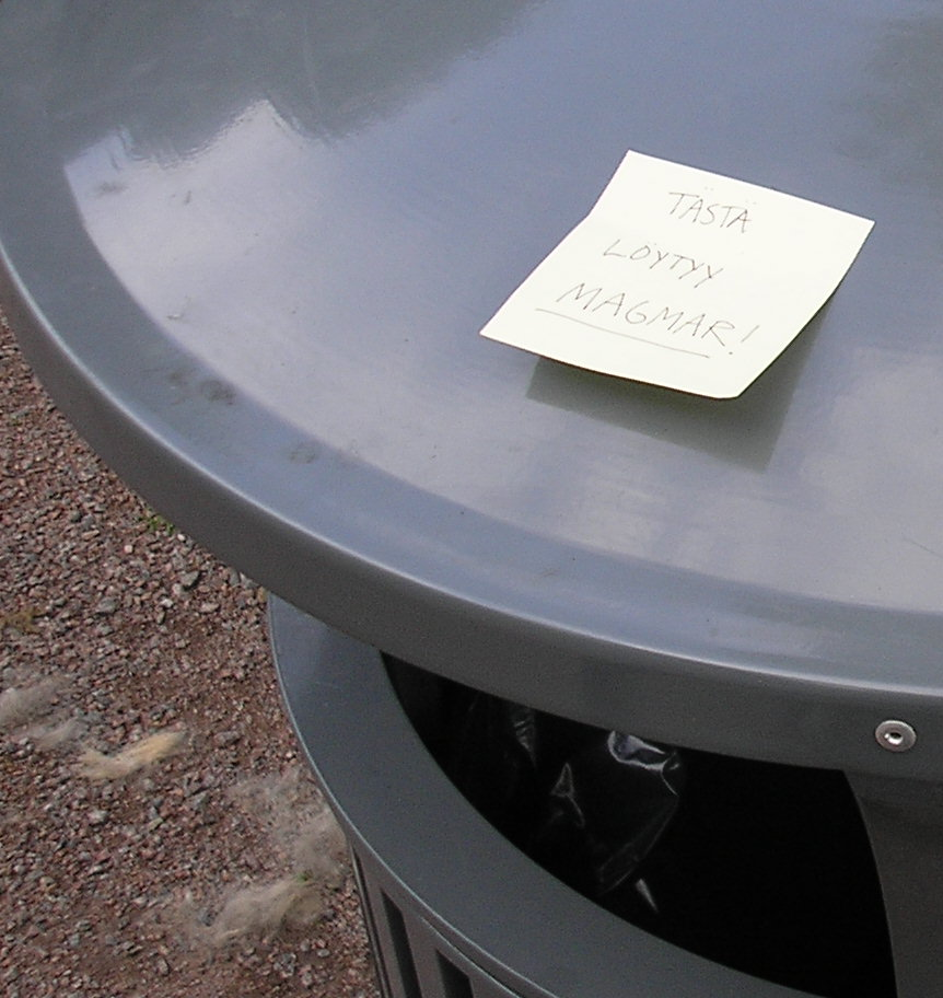 "Tästä löytyy Magmar!" Muille Pokémon Go -pelaajille post-it-lapulla jätetty vinkki roskiksen kannessa Tampereen Hämeenpuistossa elokuussa 2016.